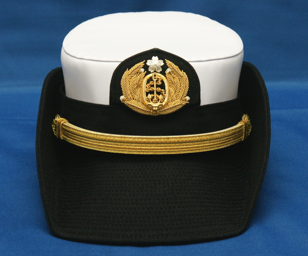 海上自衛隊女性自衛官幹部正帽